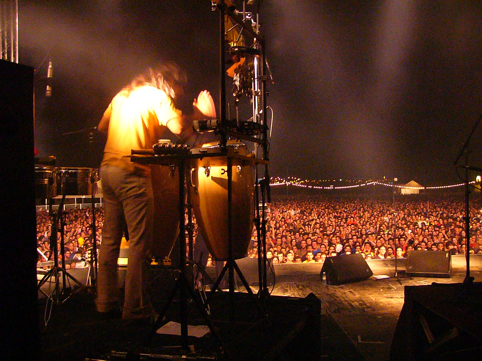 Festival Rock Zaidín 2004. Público desde el escenario.